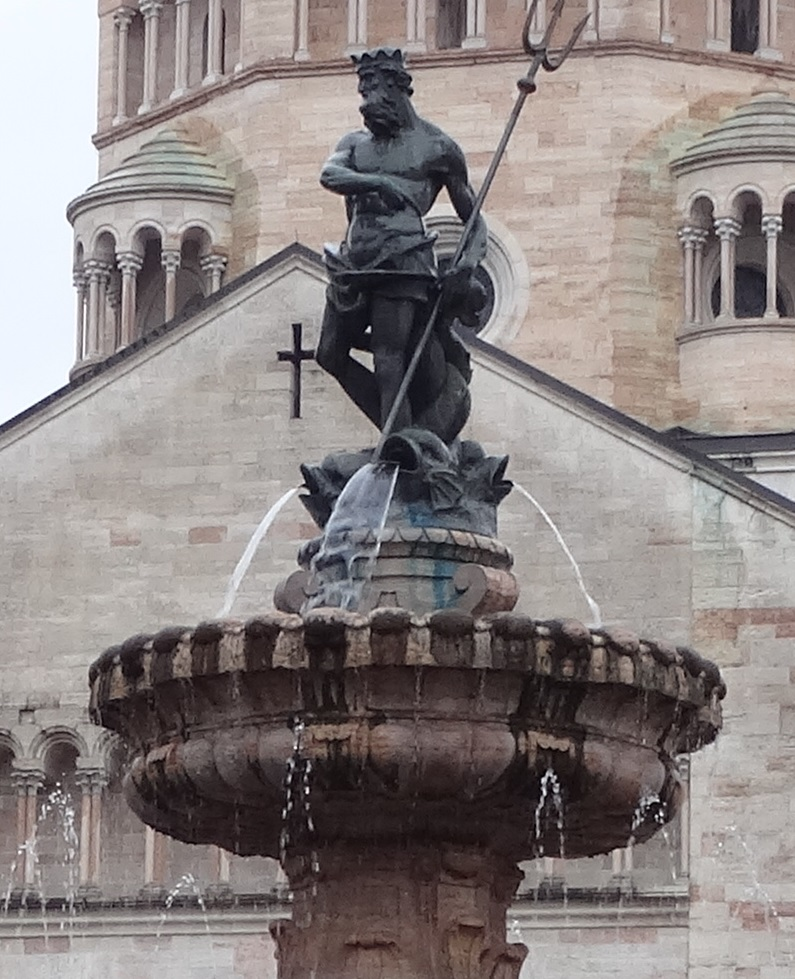 Neptunbrunnen in Trient, Detail-Ansicht mit Neptun, Wasserspeiern und oberstem Becken